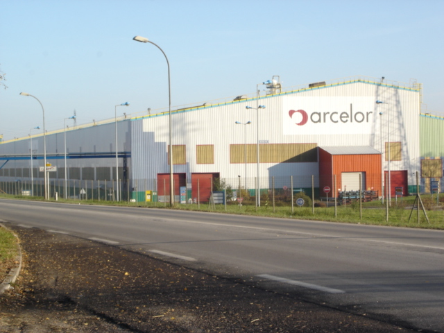 La halle d'électrozingage ELSA à Florange, Moselle, en 2005.